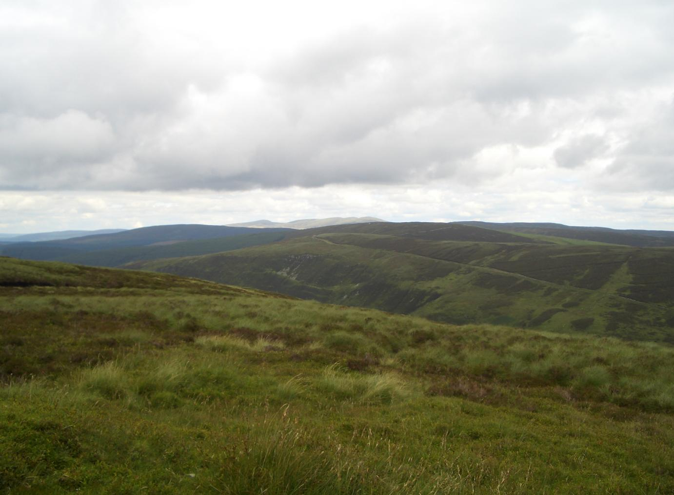 pen boncyn trefielw